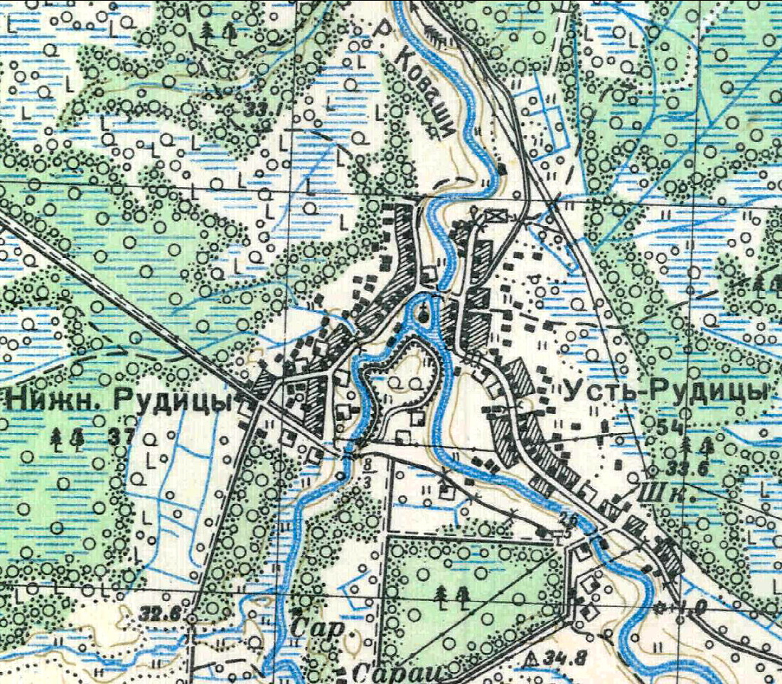 Топографическая карта Ленинградской области, квадрат О-35-11-Г-б (Усть-Рудицы), деревня Усть-Рудица.